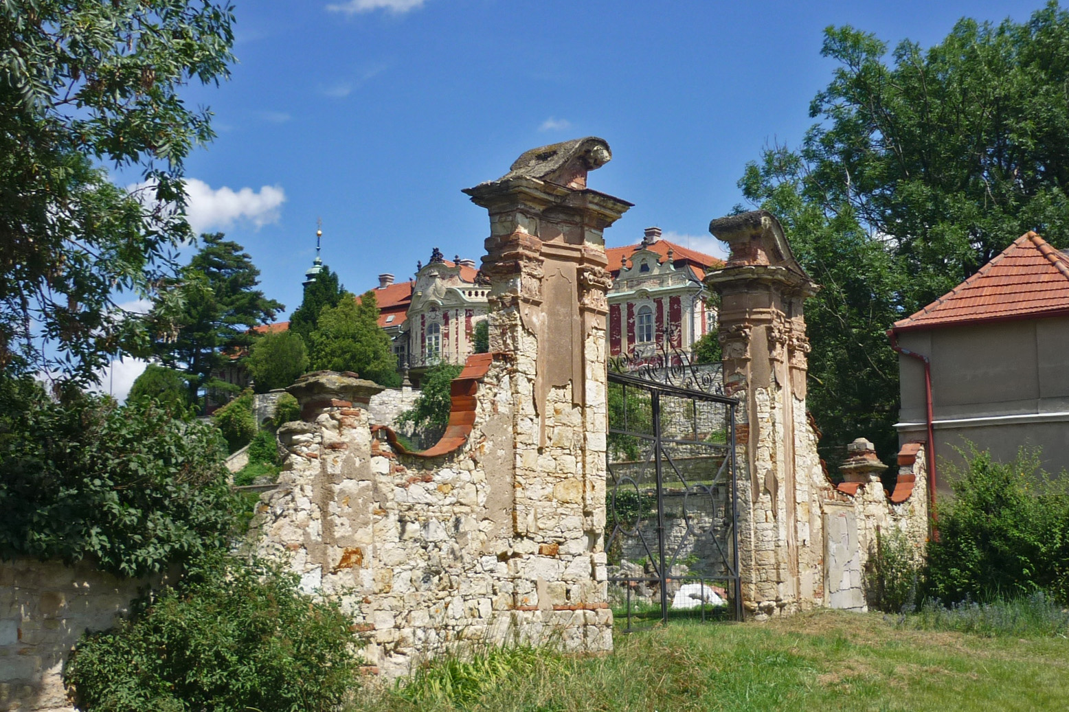 Schloss Stecknitz / Stekník